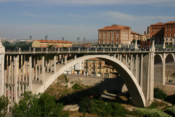 Teruel